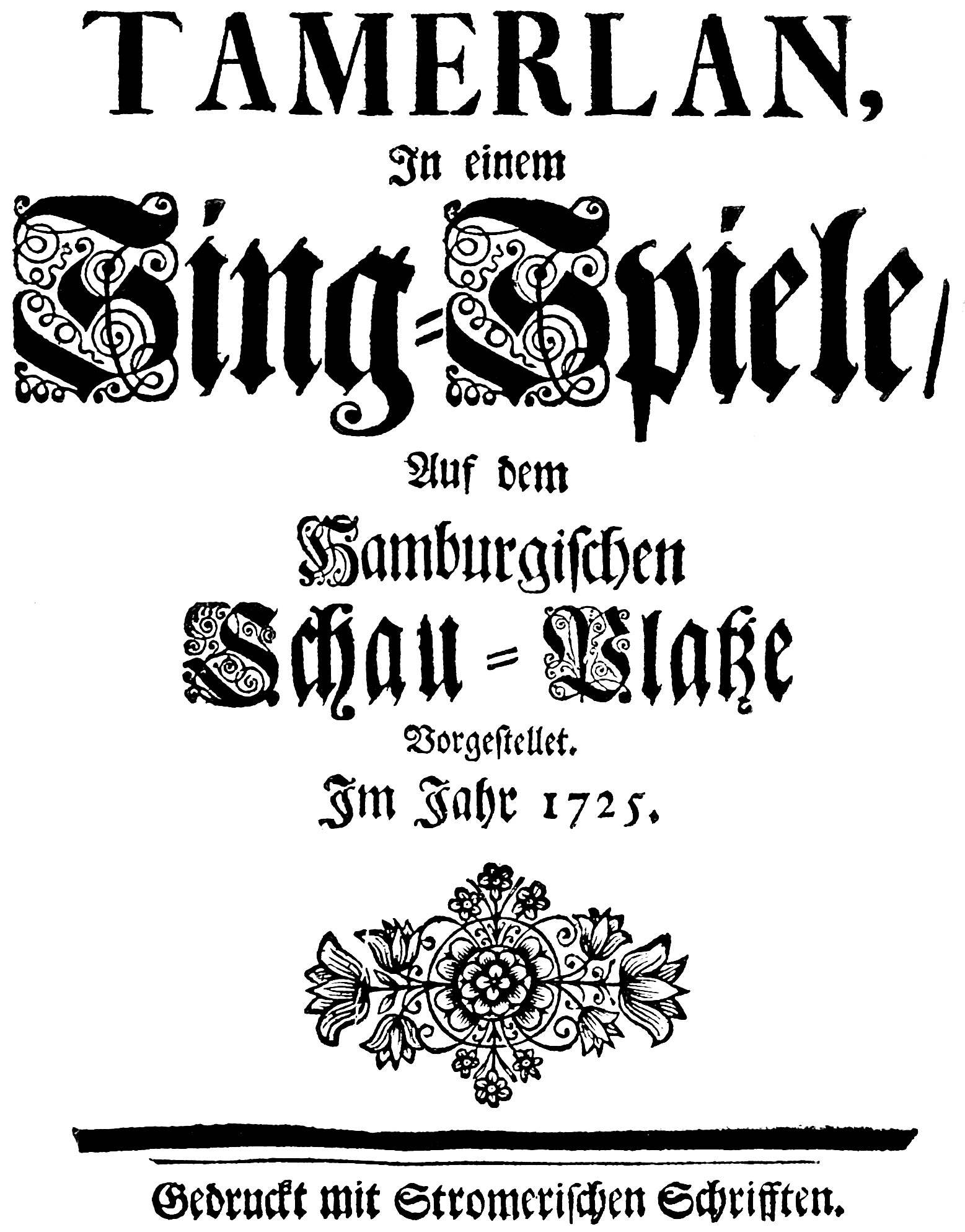 Titelseite des Hamburger Librettodruckes von 1725